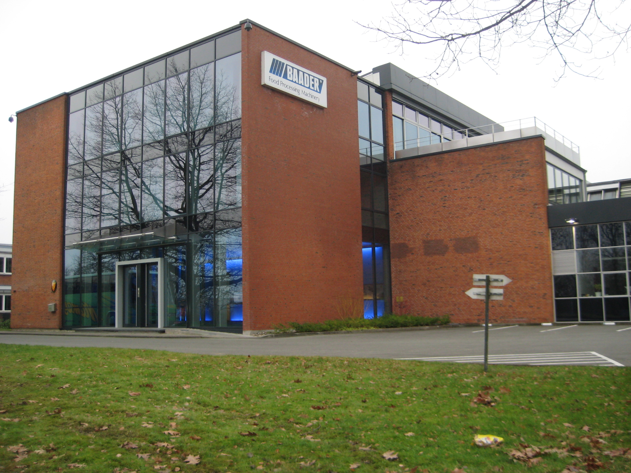 Verwaltungsgebäude Nordischer Maschinenbau Rud. Baader in Lübeck, aufgenommen von der Geniner Straße